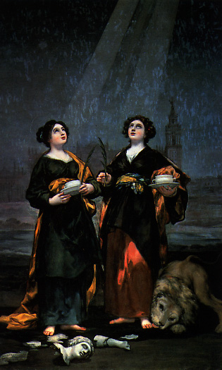 El cabildo catedralicio sevillano le encargó este cuadro a Goya en 1817, y por mediación de Agustín Ceán Bermúdez, que era un erudito y escritor de arte y amigo personal de Goya. El cuadro estaba destinado al altar de la Sacristía de los Cálices de la catedral de Sevilla, (España), donde aún permanece. Y conviene señalar que las santas alfareras, Justa y Rufina, que son las patronas de Sevilla, fueron martirizadas por haberse negado a adorar una imagen de la diosa Venus, y siempre suelen ser representadas junto a objetos de barro como símbolo de su profesión y con las palmas del martirio. En esta obra un león lame mansamente el pie de Santa Rufina, herido por haberla forzado a caminar desde la sierra hasta Sevilla, y esta ciudad aparece al fondo, destacándose la Torre de la Giralda de la catedral sevillana, que según la tradición quedó en pie por la intervención milagrosa de estas mártires durante el terremoto que asoló Sevilla en 1504.